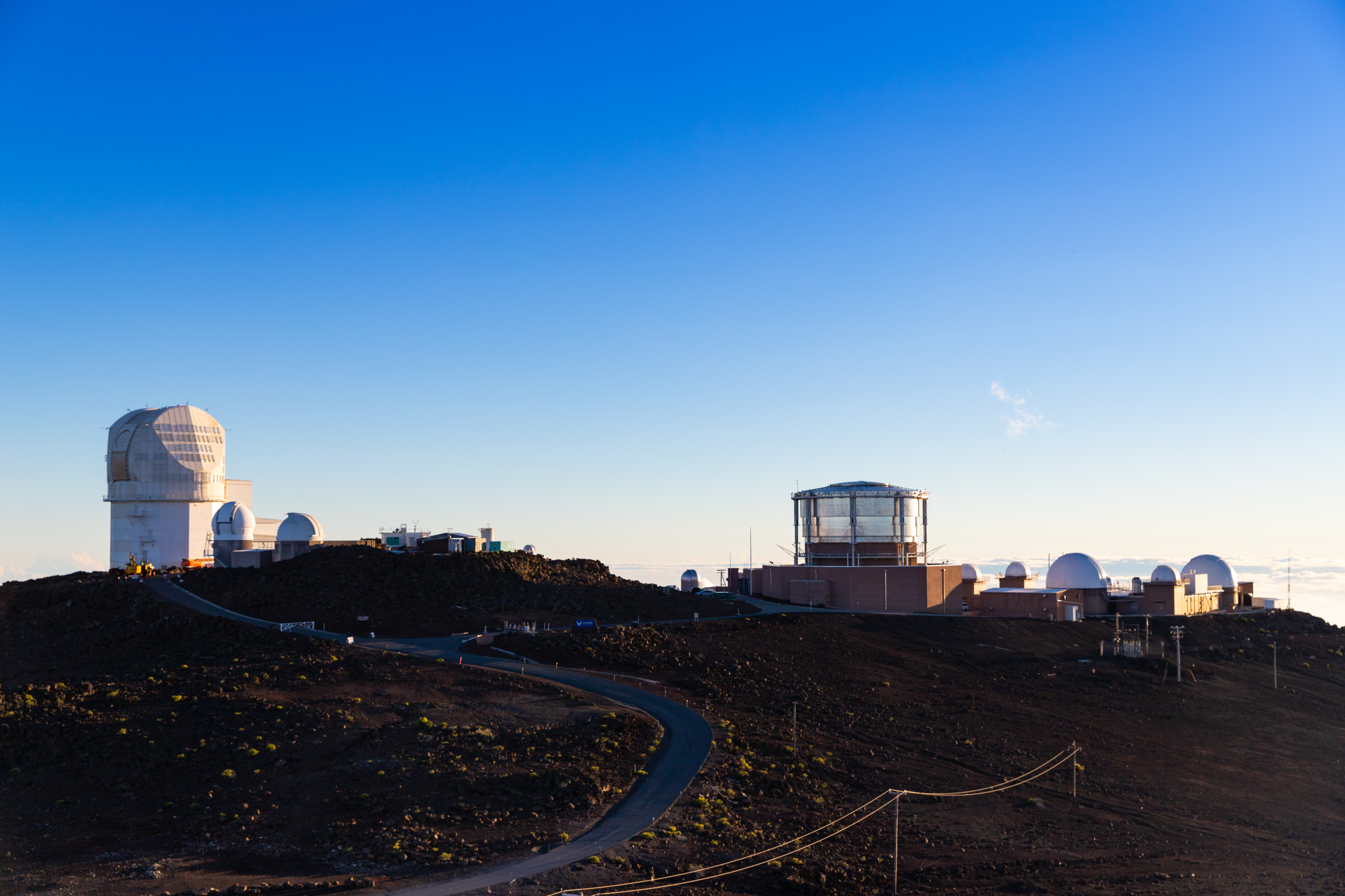 Haleakala Observatory Maui